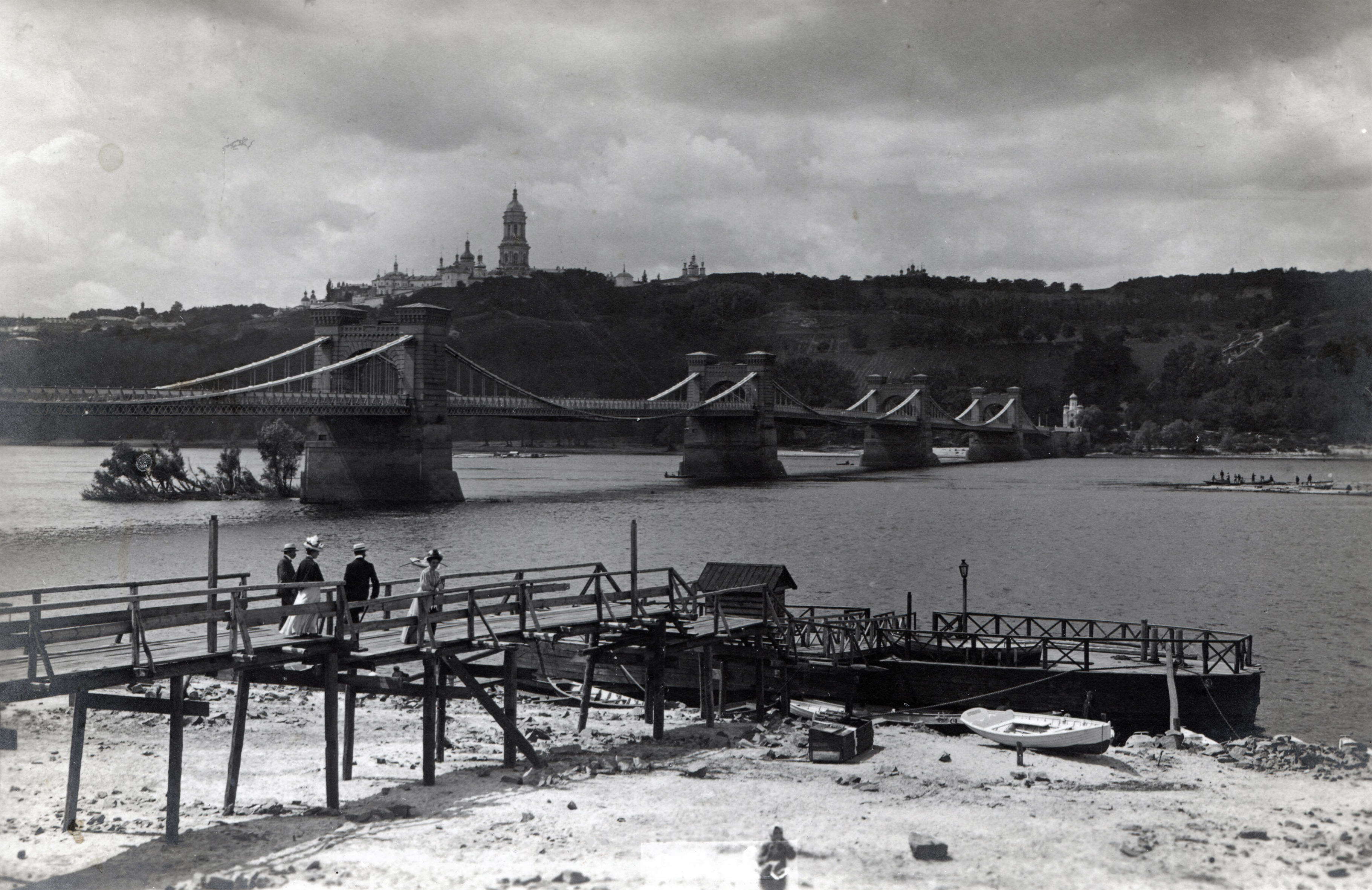 Дебаркадер. Краєвид на Києво-печерську лавру і Ланцюговий міст